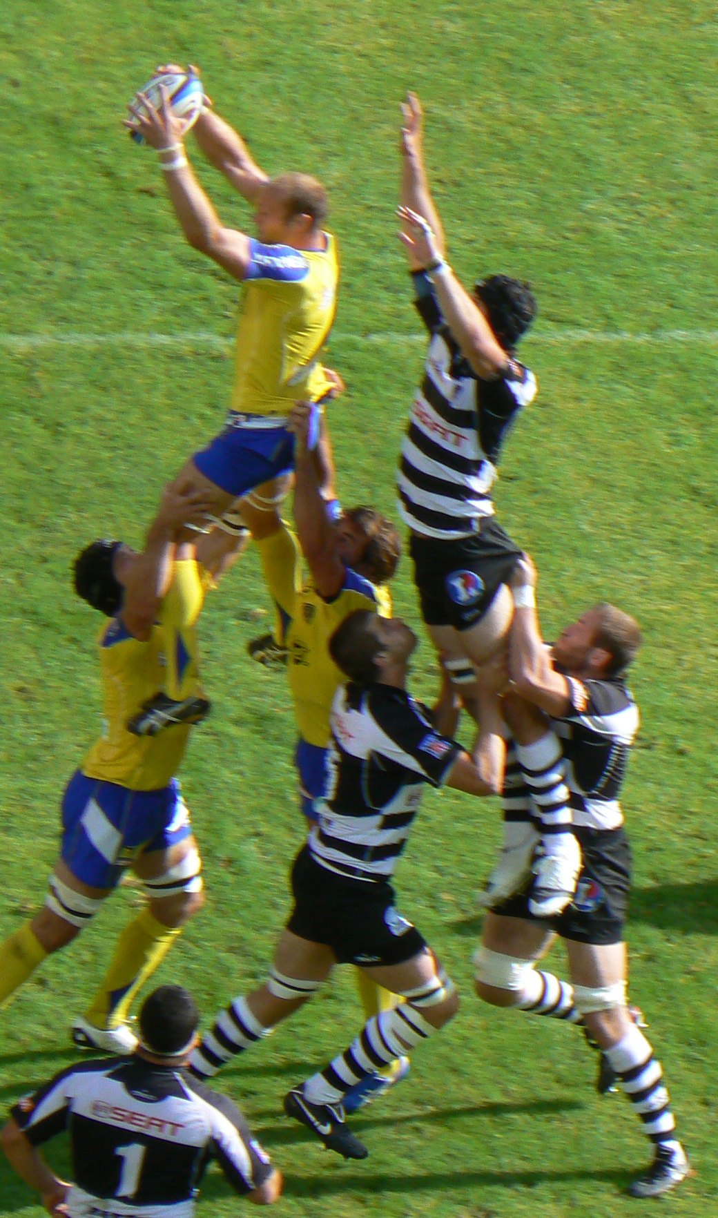 L'ASM Clermont Auvergne reçoit le CA Brive au stade Marcel-Michelin de Clermont-Ferrand. L'international français clermontois Julien Bonnaire s'empare du ballon